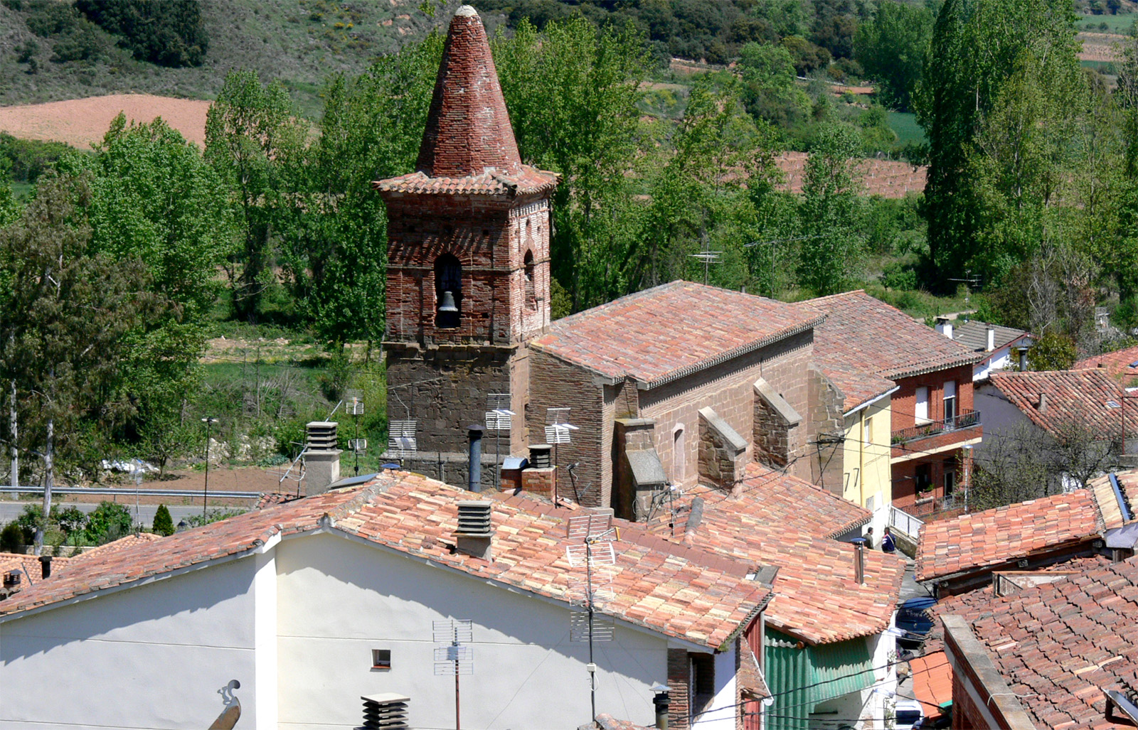 Iglesia de Nuestra Señora del Patrocinio en Daroca de Rioja (España).